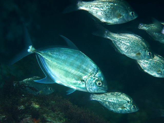 クロヒラアジ(Carangoides ferdau)